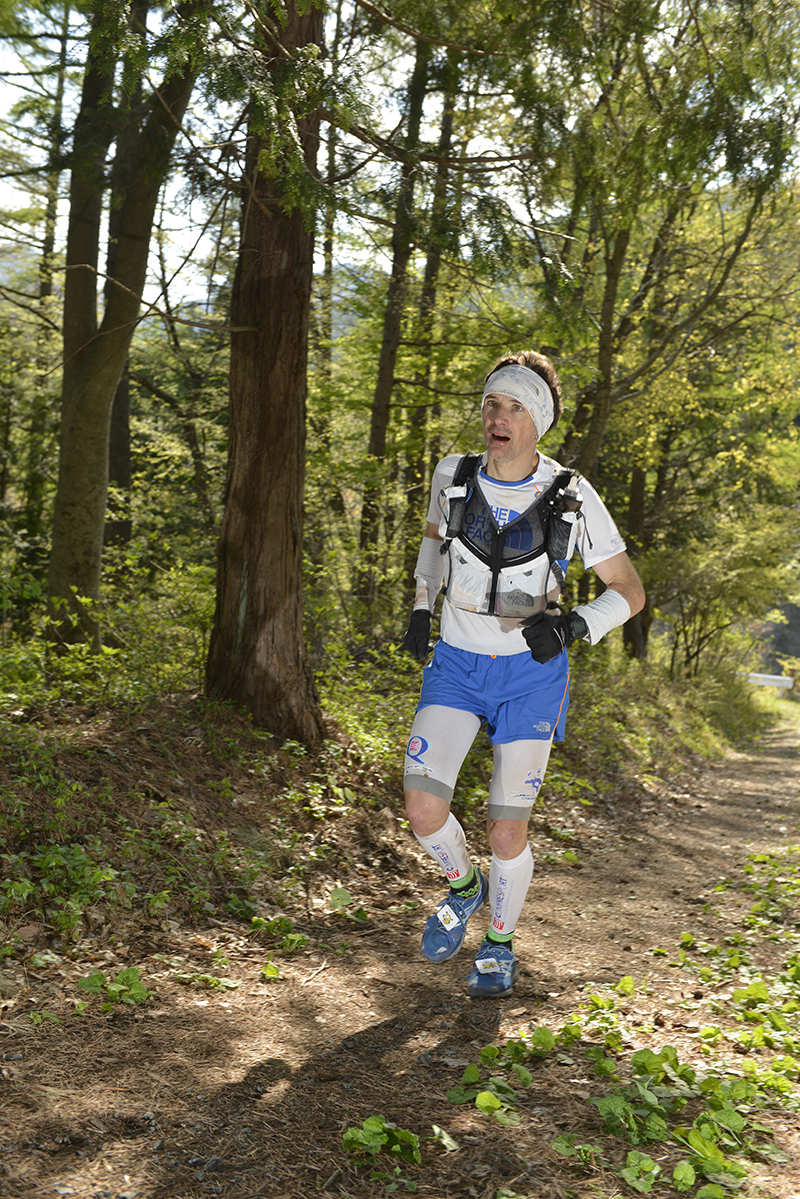 Sébastien durant l'UTMF 2013